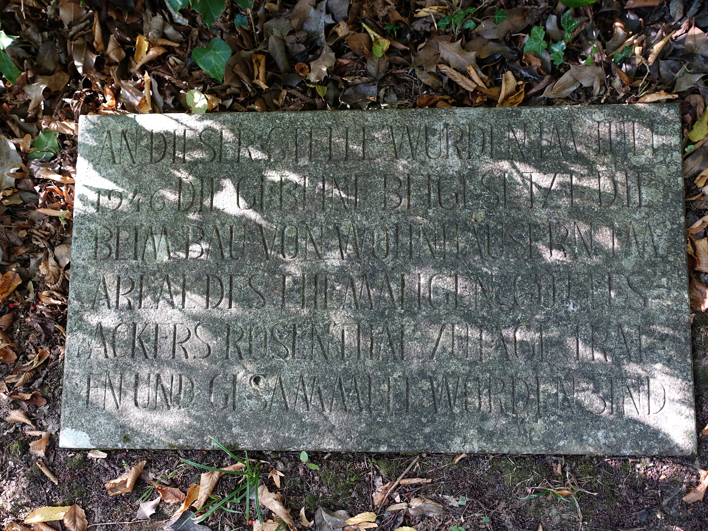 Inschrift: An dieser Stelle wurden im Juli 1946 die Gebeine beigesetzt die beim Bau von Wohnhäusen im Areal des ehemaligen Gottesacker Rosenthal zutage traten und gesammelt worden sind. Standort: 47°33'58.9"N 7°38'35.6"E, 47.566358, 7.643208